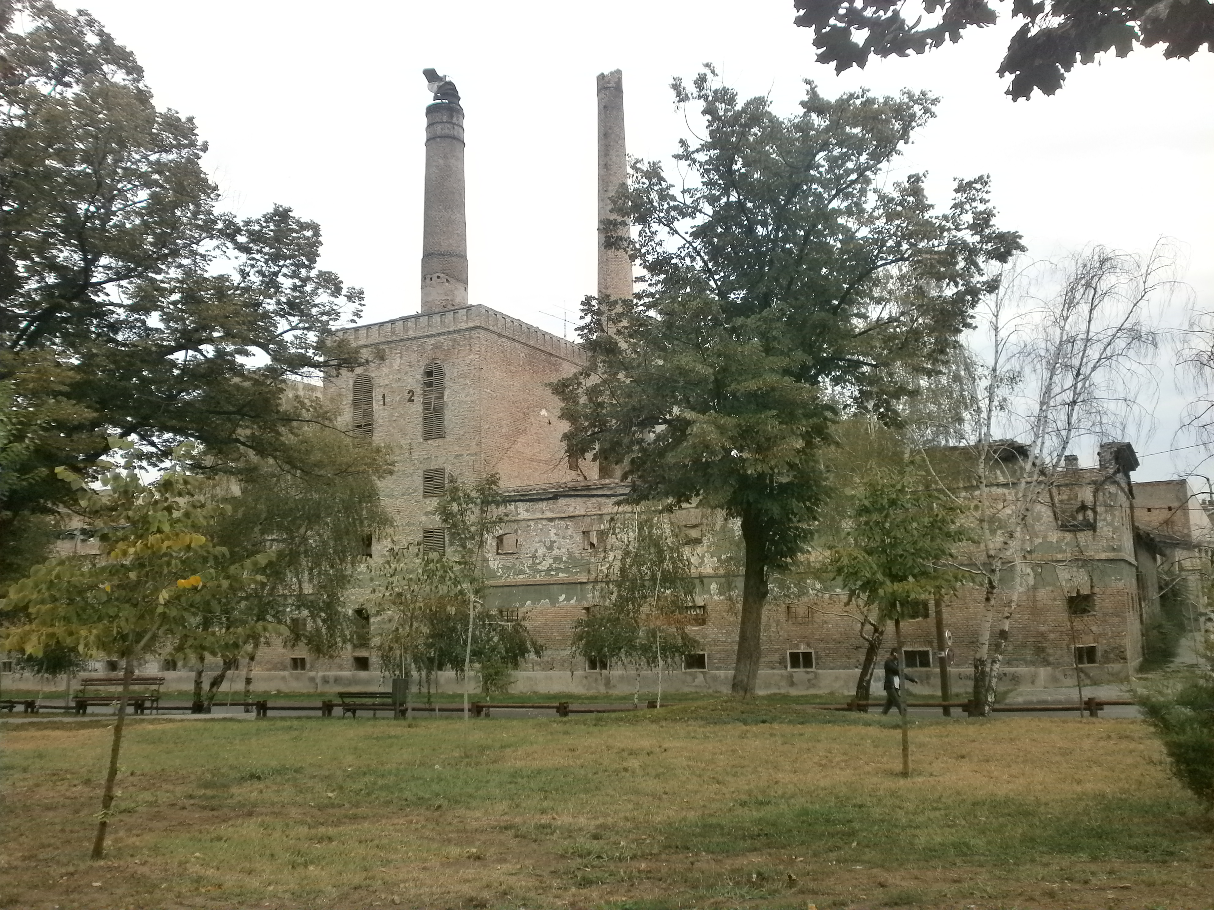 Народна пивара у Панчеву, оснивач Ђорђе Вајферт.